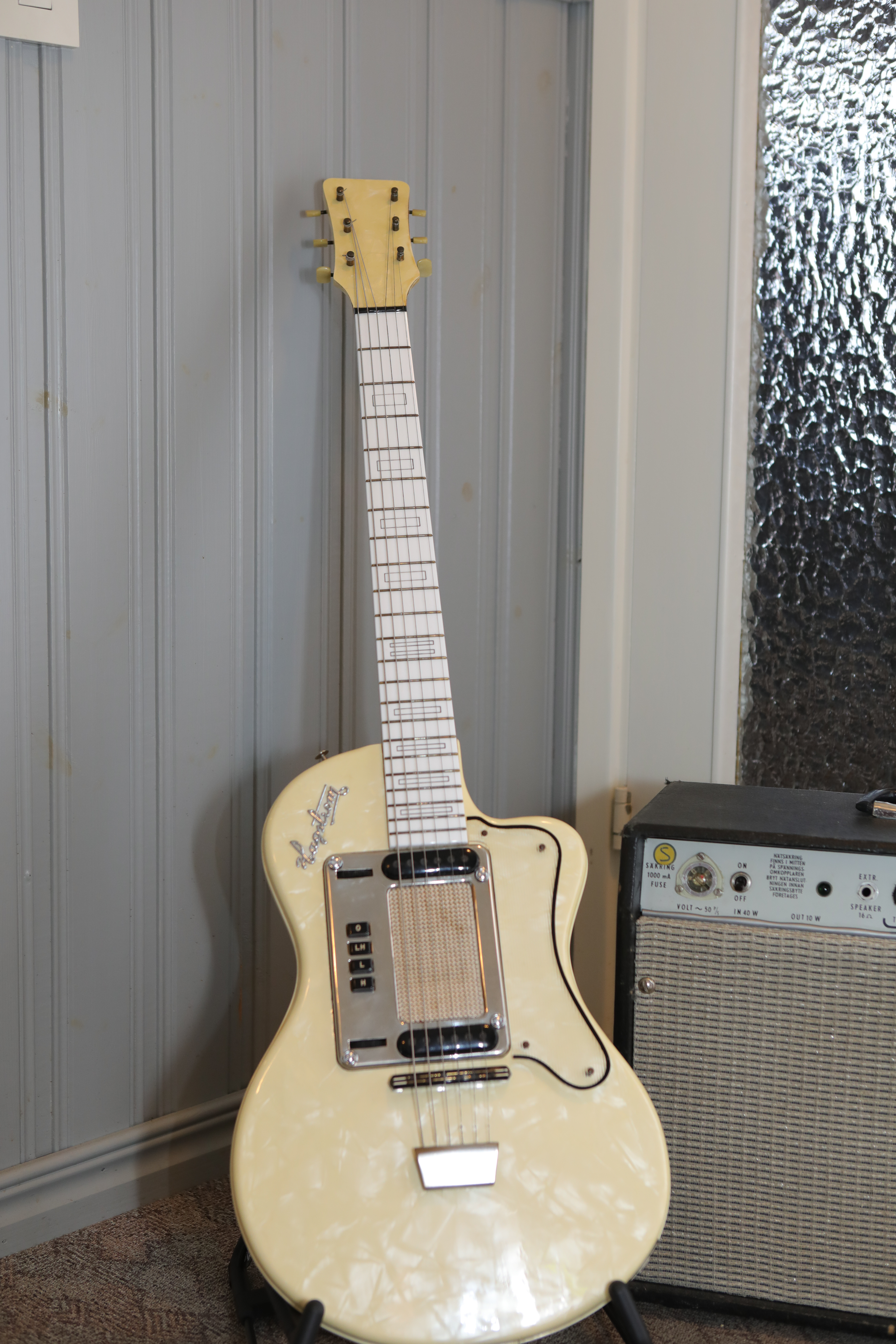 Hej. Detta är min gitarr. Vi är lika gamla. Nedan är ur köpehandlingen. Köpt av Janne Godman Hagström Vintage guitars. Skadar inte med en bild. Dag Holm 0046730482693 "BESKRIVNING HAGSTRÖM DE LUX NR 449151 är nr 50 i batch 449 ( eftersom batchen startar med 449101 ) Batch 449 är dessutom den allra första batchen med serietillverkade Hagström elgitarrer. Detta innebär att 449151 är den femtionde serietillverkade elgitarren från starten av produktionen!"